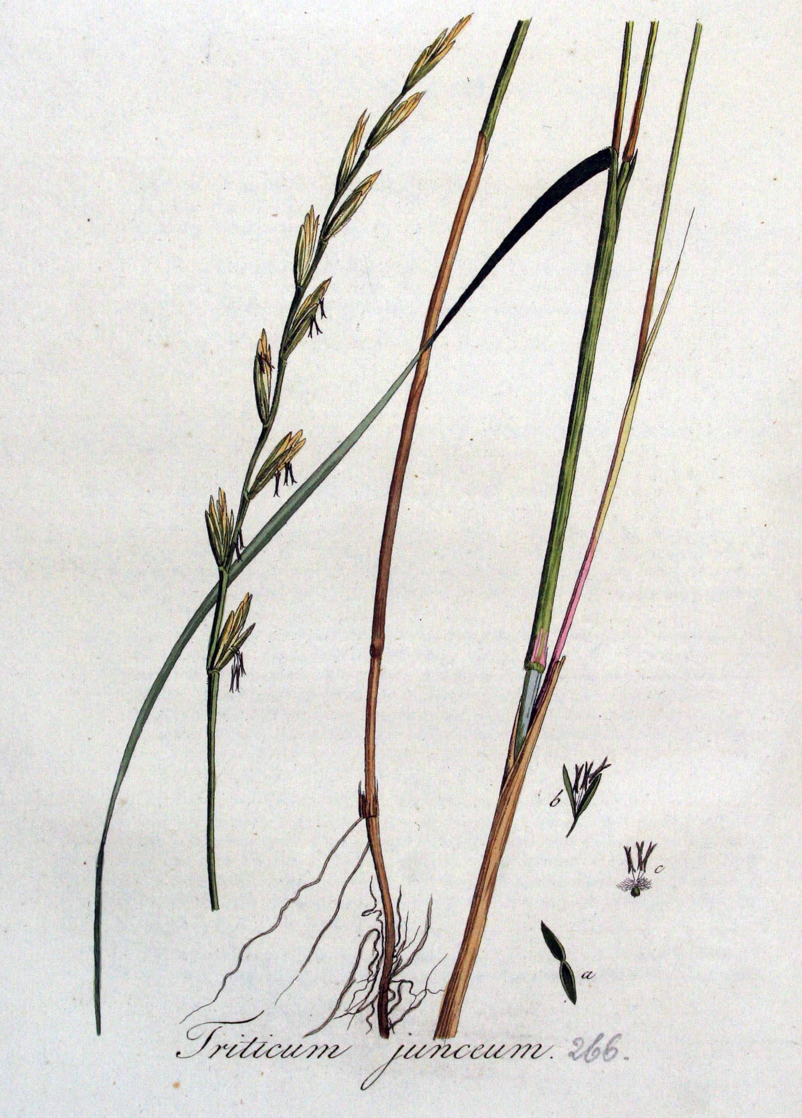 Elymus farctus (Viv.) Runemark ex Melderis subsp. boreoatlanticus (Simonet & Guinochet) Melderis (Syn. Triticum junceum L)